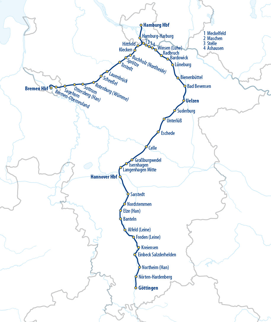 Liniennetz der Metronom Eisenbahngesellschaft ab 9. Dezember 2018